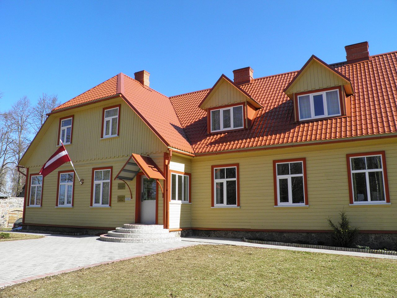 Самоуправление | Vidsalas pašvaldības ēka